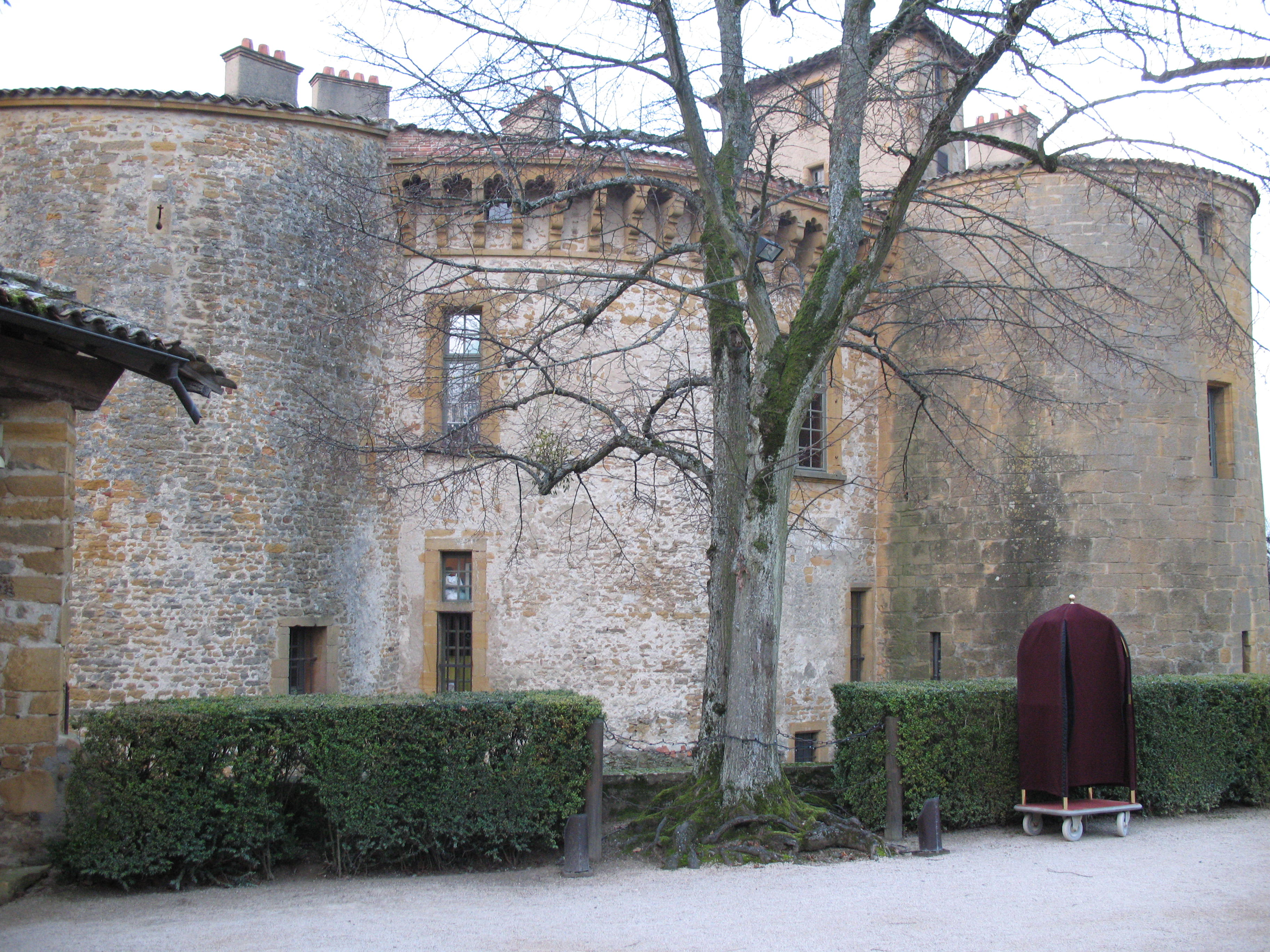 Château de Bagnols à Bagnols dans le Rhône